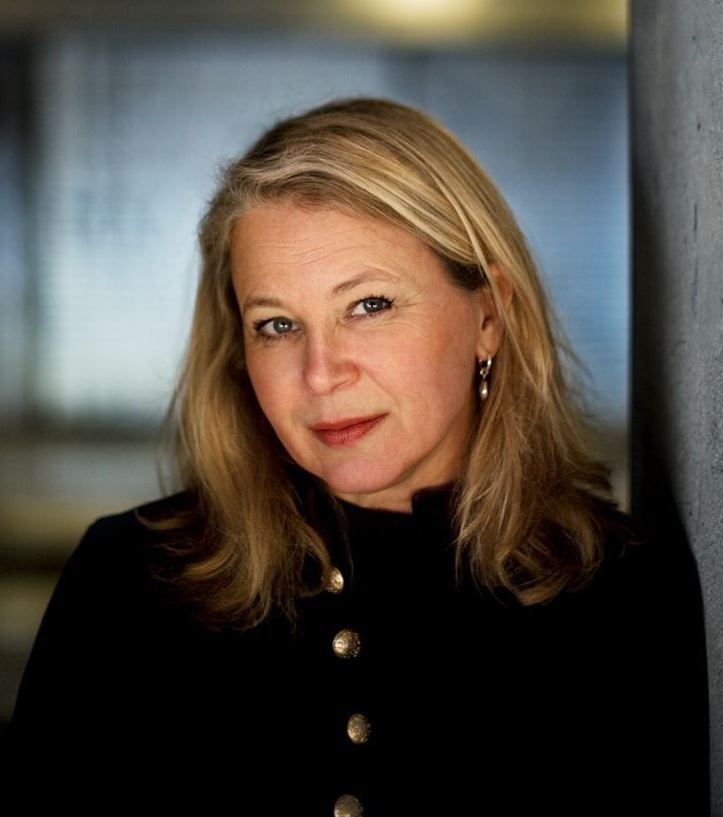 Författaren och filmrecensenten Helena von Zweigbergk.